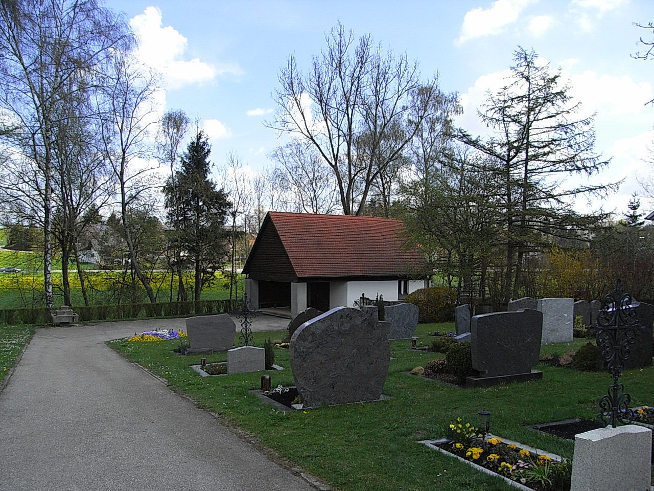 Aussegnungshalle Friedhof Dreieinigkeitskirche Buxach